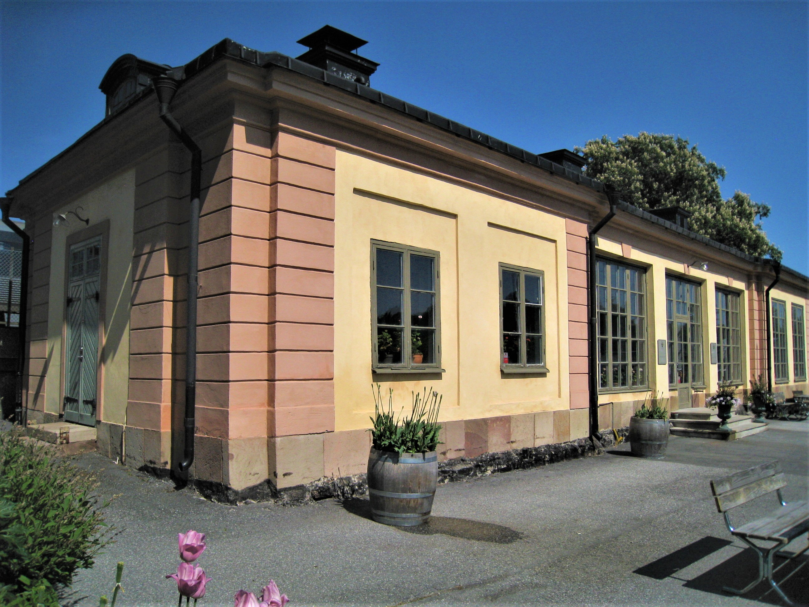 Orangeriet vid Åkeshovs slott, Bromma. Orangeriet från 1749 ritat av arkitekten Carl Hårleman.